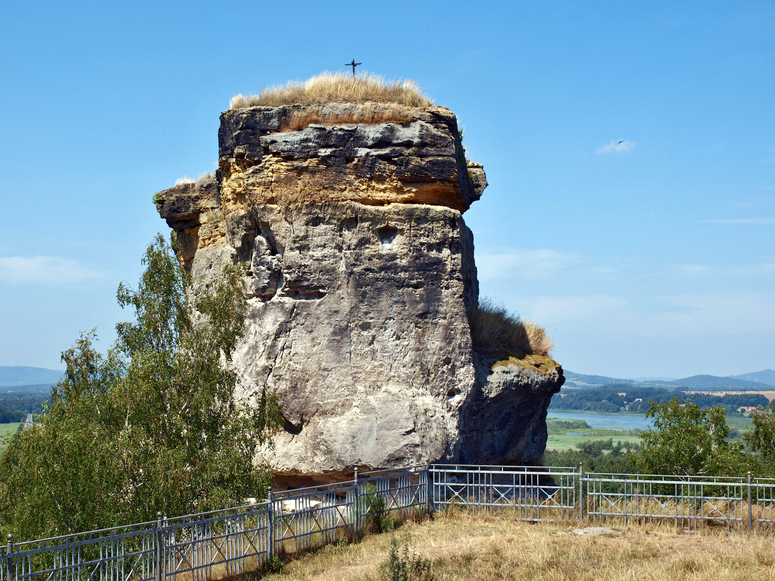 Jestřebí